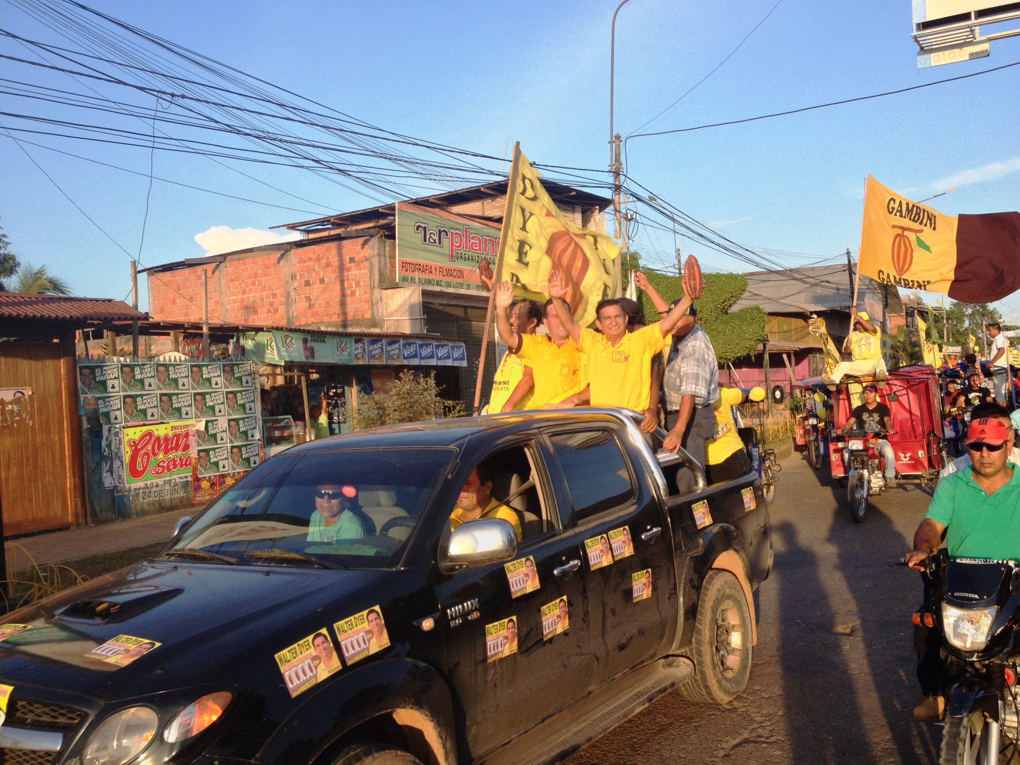 Manuel Gambini como candidato regional del departamento de Ucayali con la organización del Movimeinto Independiente Regional Cambio Ucayalino. Al lado izquierdo de la camioneta está Gilberto Arévalo para el distrito de Yarinacocha; al lado derecho, Walter Dyer, para la provincia de Coronel Portillo.